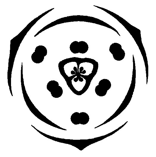 zelfgemaakte tekening; bloemdiagram van tulp